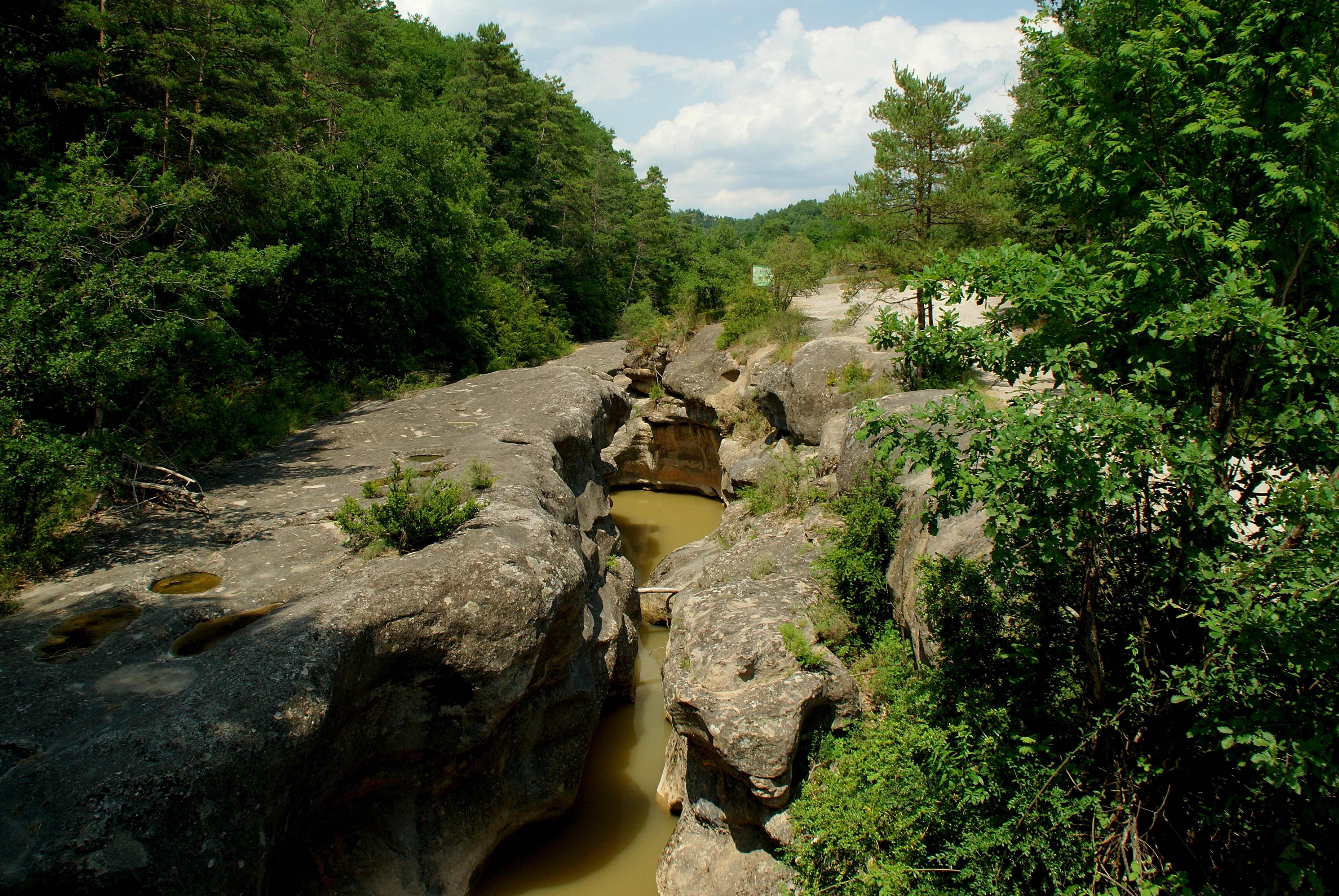 Riera de Merlès - Santa Maria de Merlès This is a a photo of a natural area in Catalonia, Spain, with id: ES510058